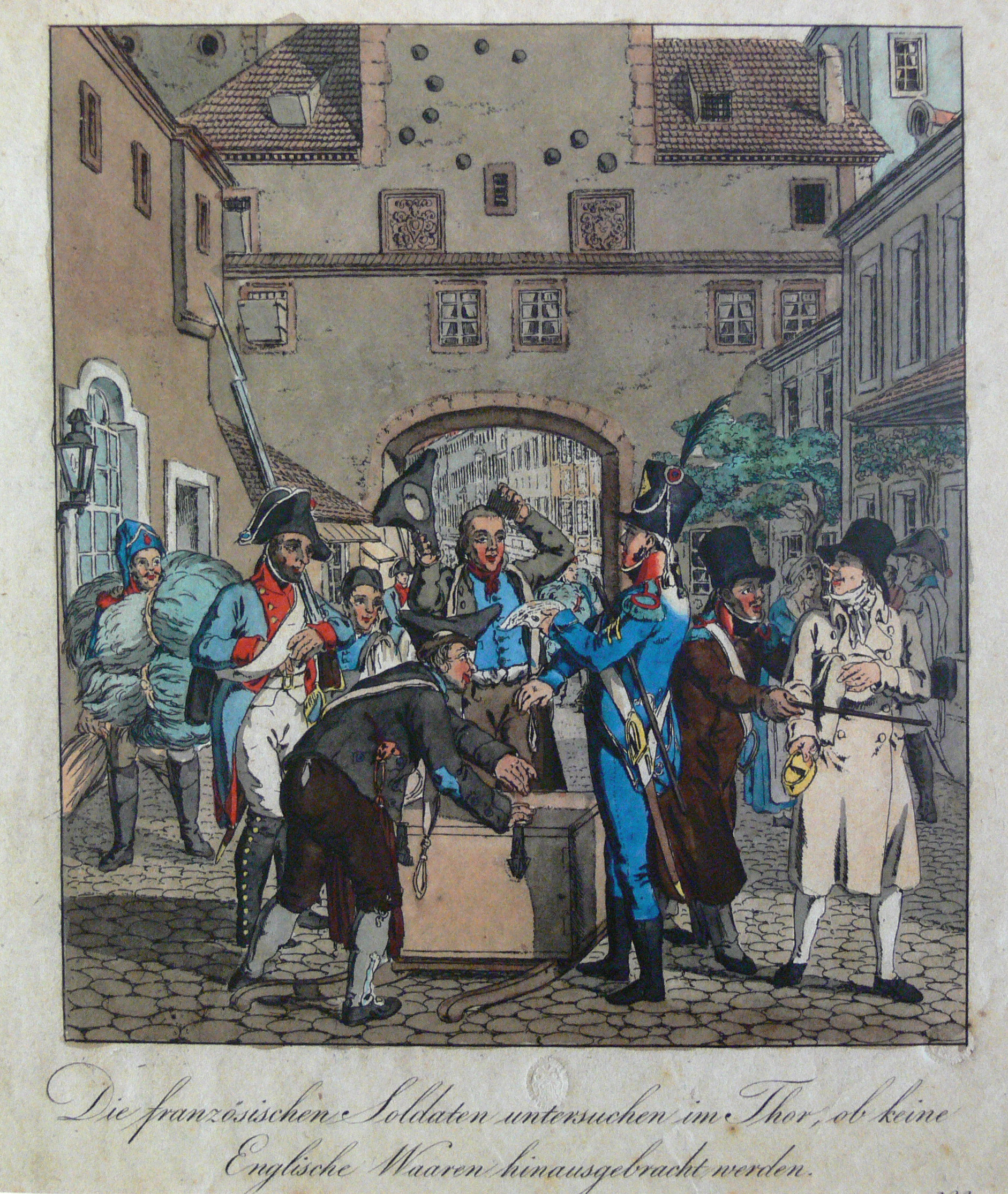 Collection: Café und Museum "Zum arabischen Coffe Baum", Leipzig Christian G. H. Geißler: Leipziger Kriegs-Scene Nr. 3. Die französischen Soldaten untersuchen am Thor, ob keine Englische Waaren hinausgebracht werden, kolorierter Kupferstich, Leipzig 1824 (eine Szene aus dem Jahr 1806)